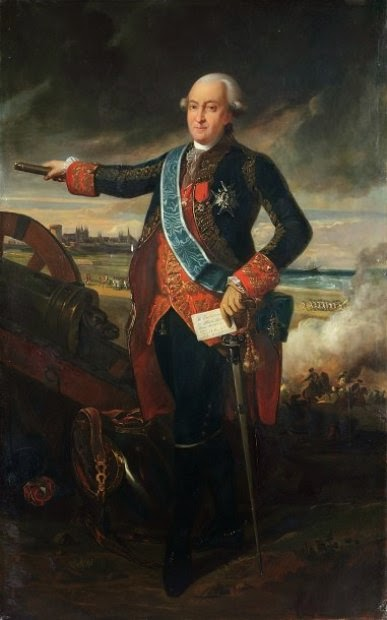 Teniente General Luis Berton de Balbe de Quiers, II duque de Crillon, I Duque de Mahón, Grande de España.